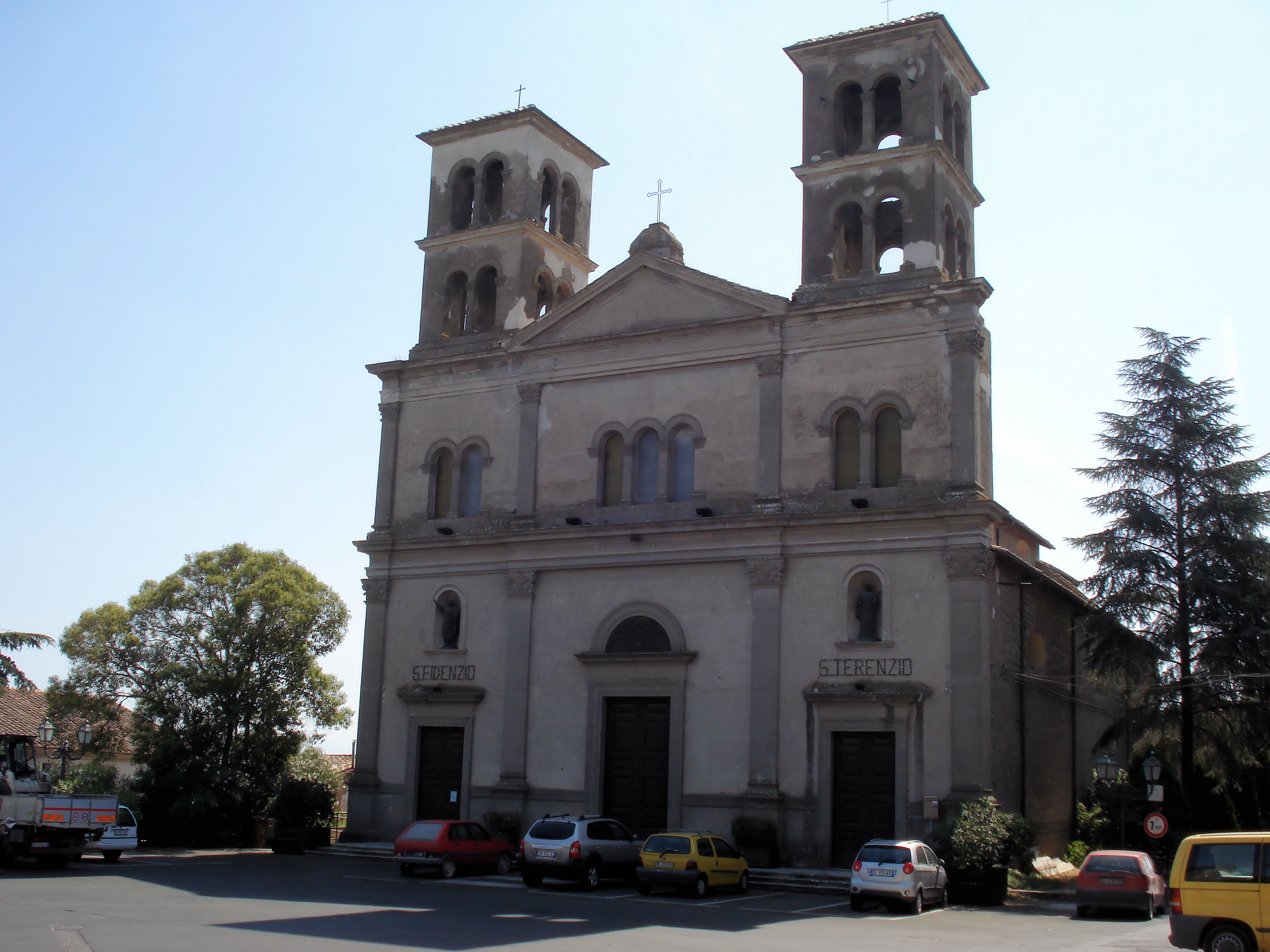 Cosmin latan,Chiesa dell'Immacolata-Bassano